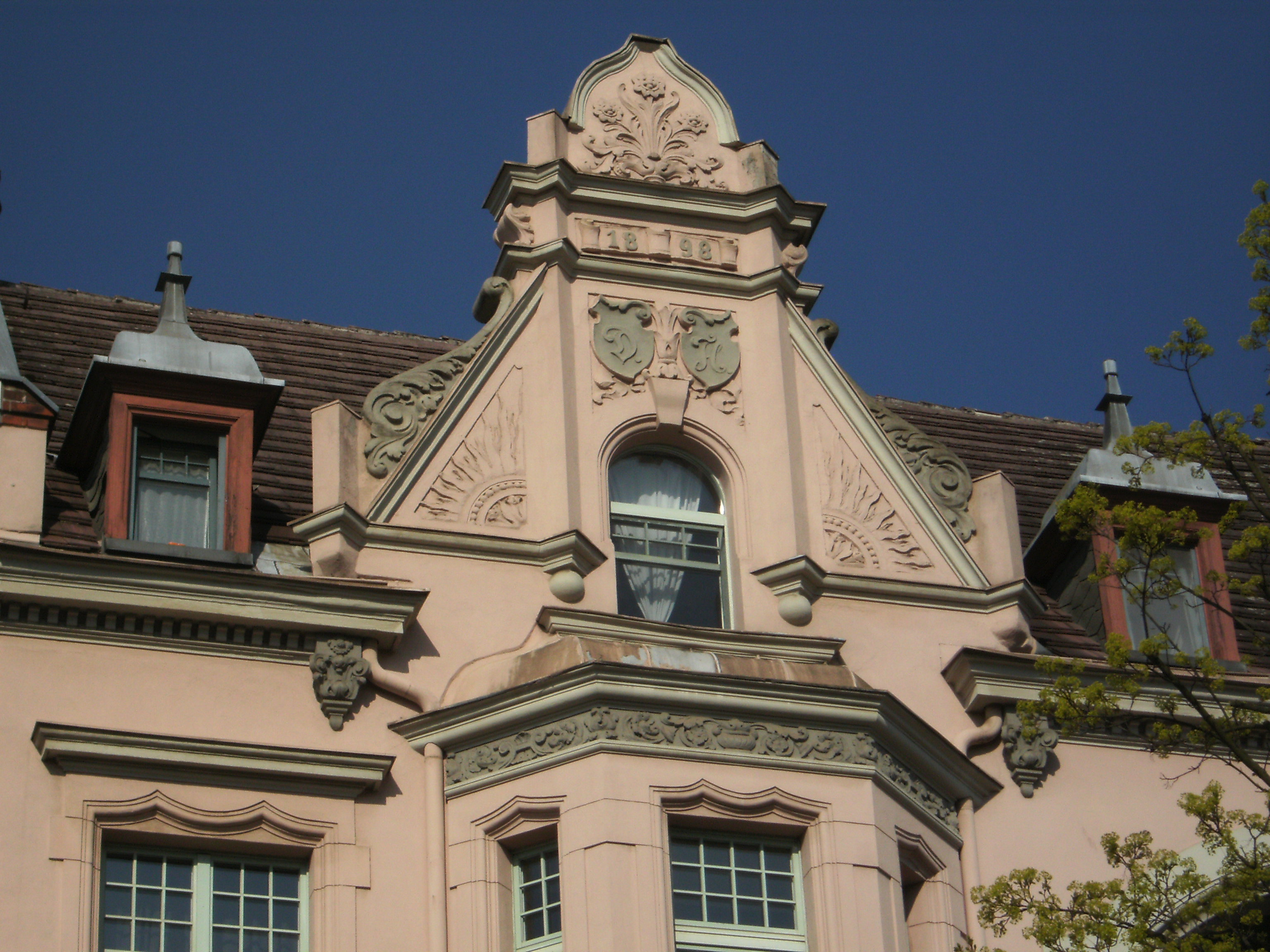 Schillerstraße 47,2